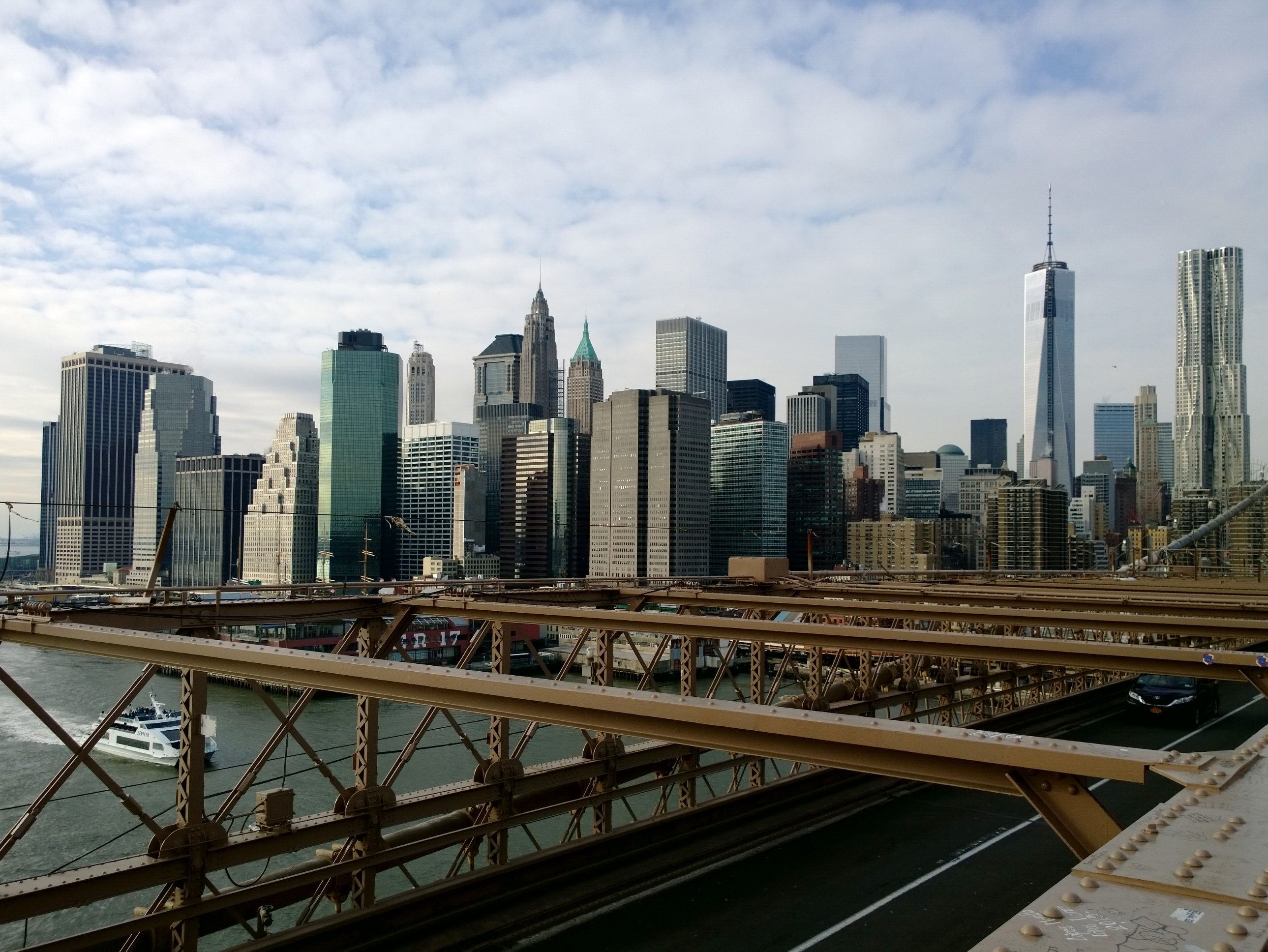 Blick auf das südliche Manhattan von der der Brooklyn Brücke aus.